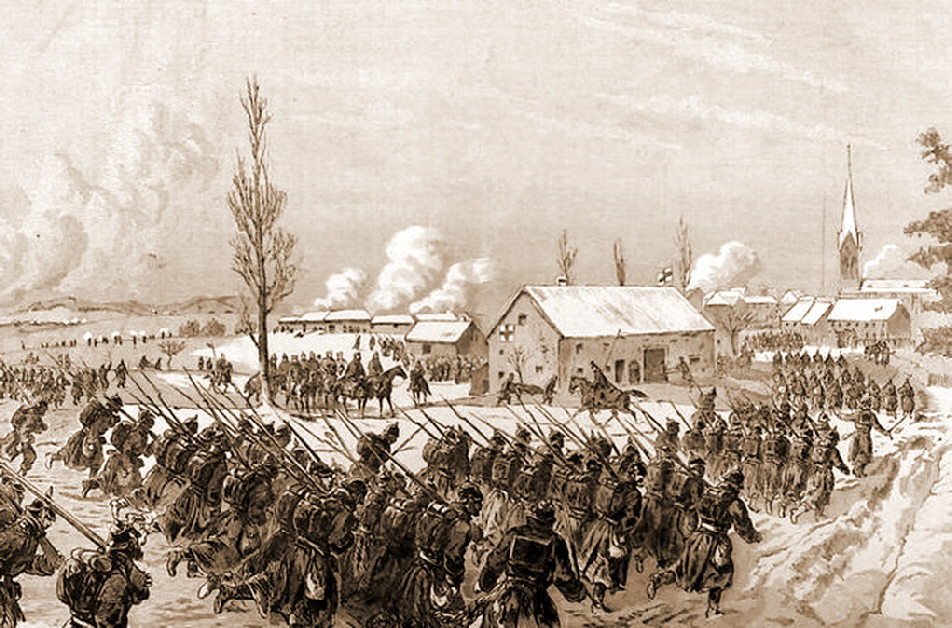 Bataille de la Lizaine (1870-1871) : les soldats prussiens à Frahier-et-Chatebier (reconnaissable au clocher caractéristique).